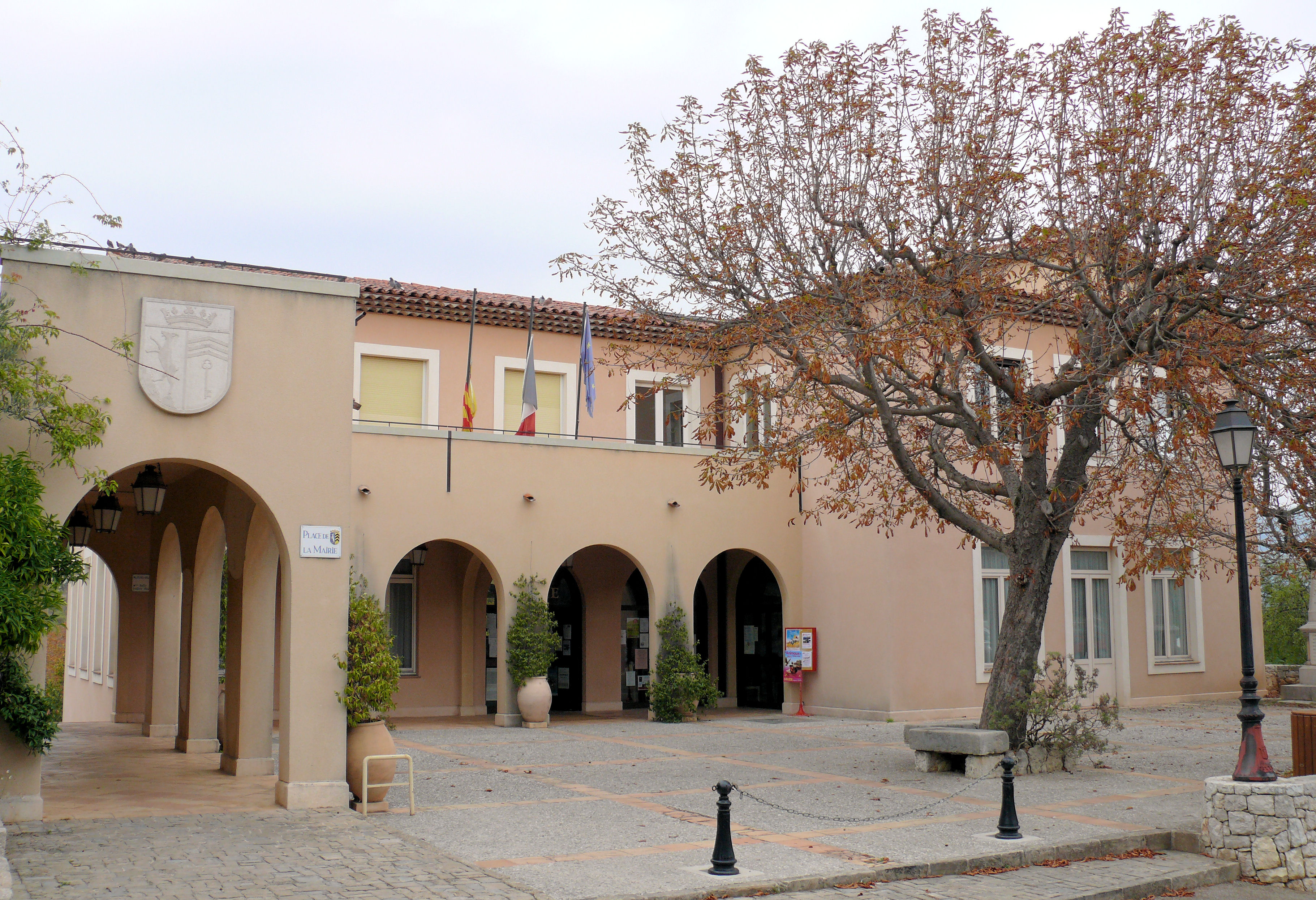 Cabris - Hôtel de ville